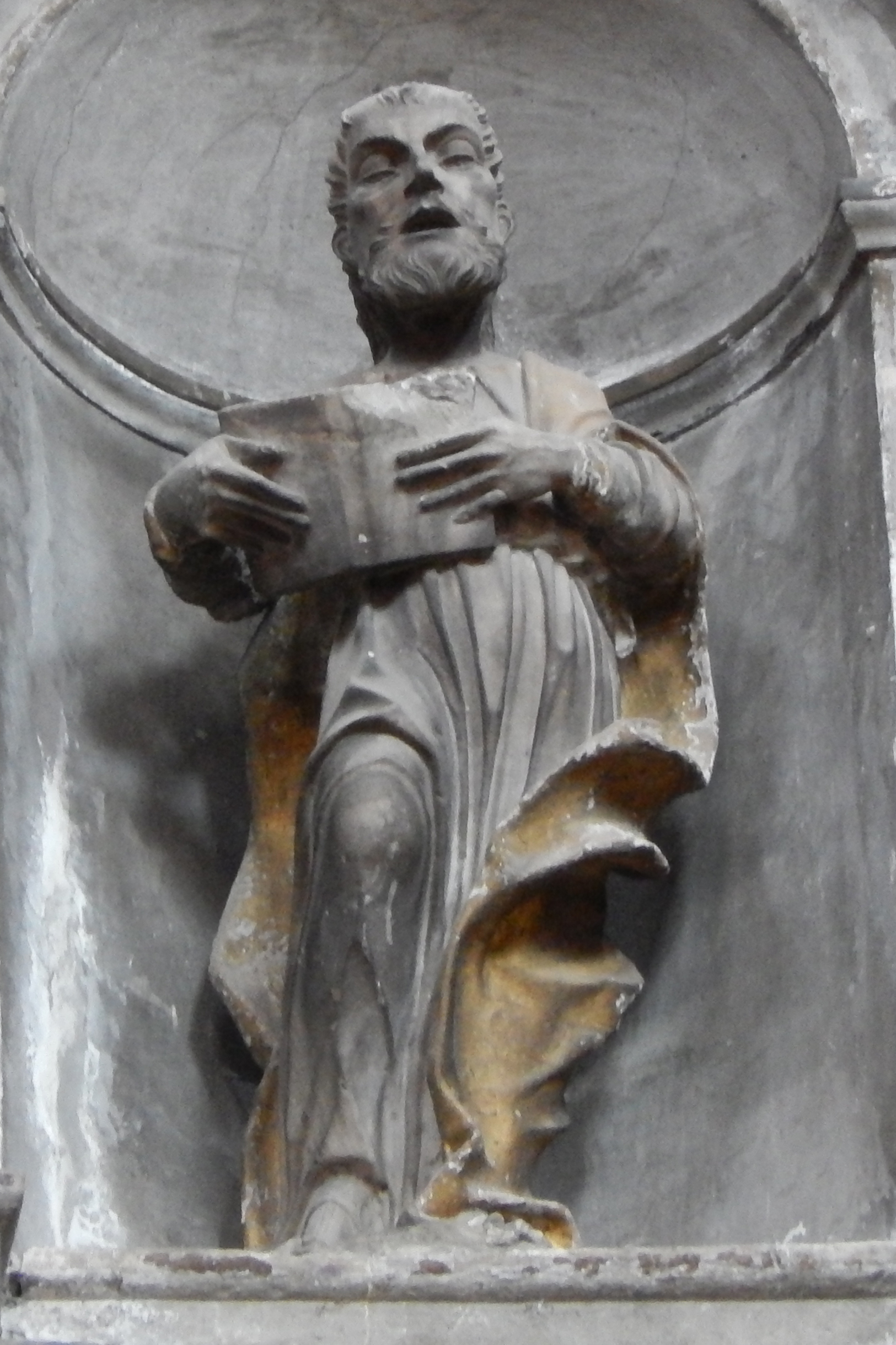 Apostolo, 1489, Gasparo Cairano, chiesa di Santa Maria dei Miracoli, Brescia